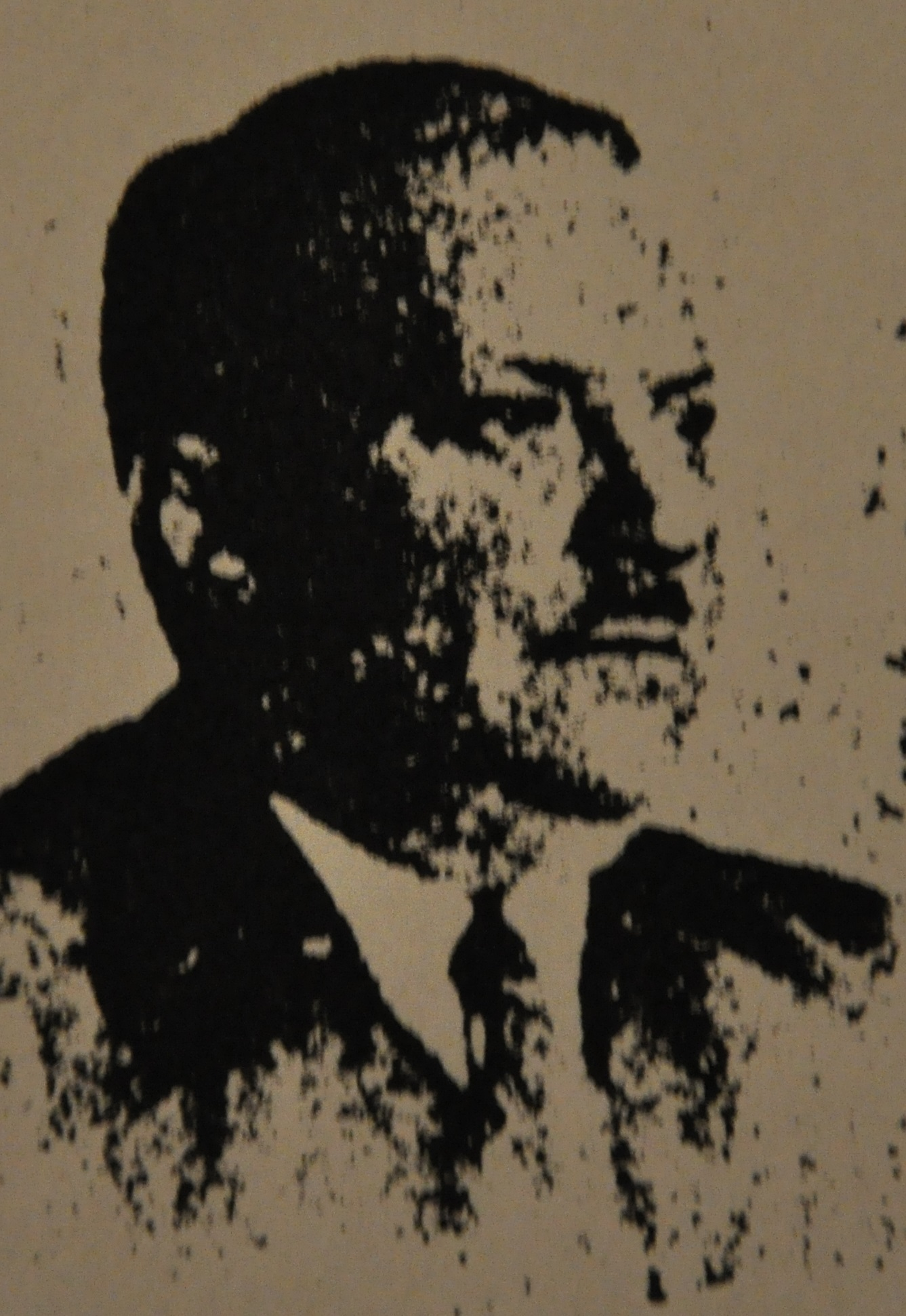 Krzysztof Szczytt-Niemirowicz - zdjęcie z końca lat 30. XX w.